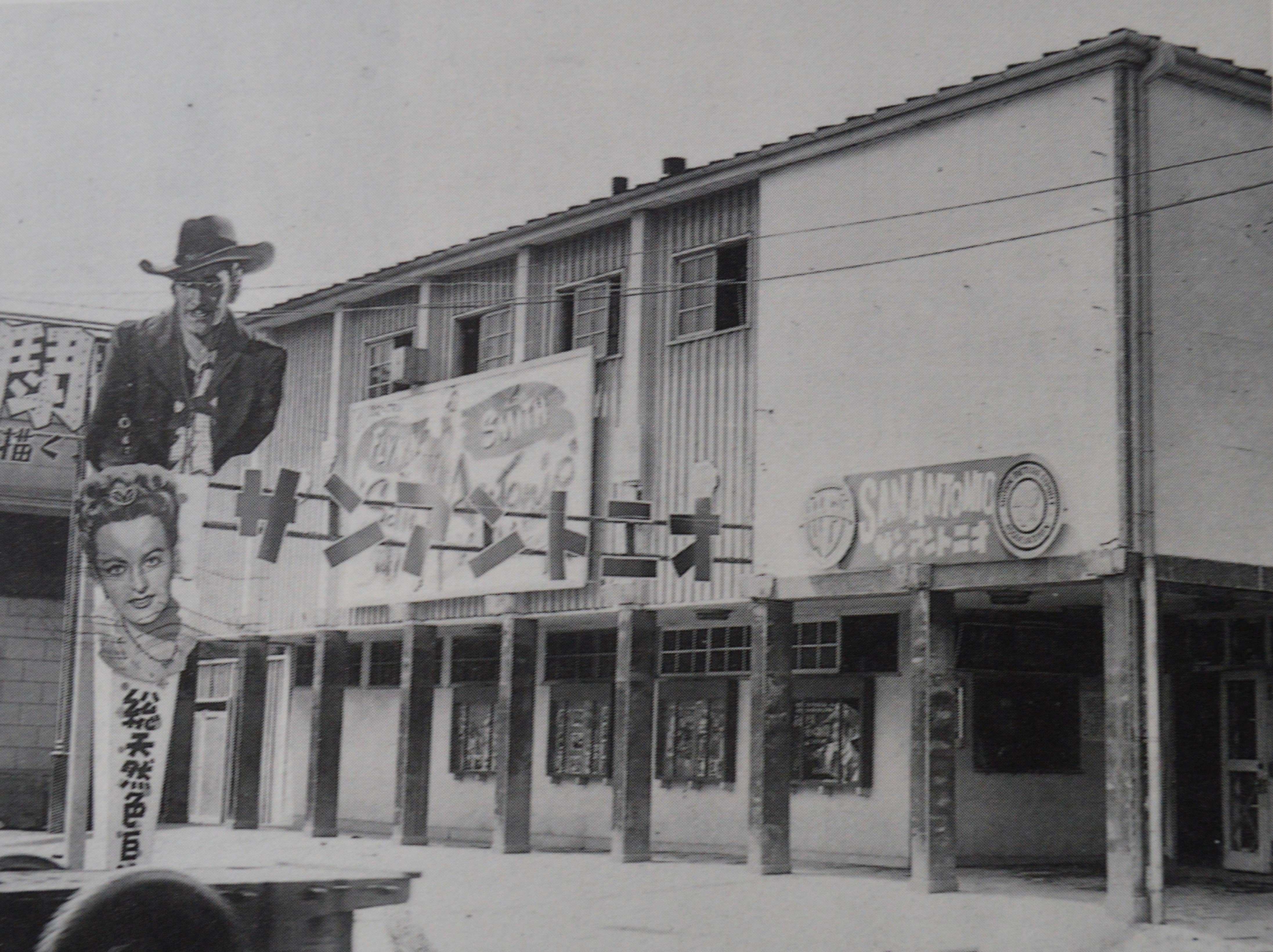 静岡市七間町の国際劇場。